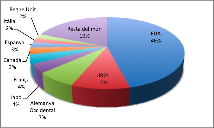 Principals estats consumidors de PCB segons Breivik et al 2002